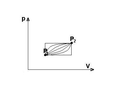 gas diagram pressure volume